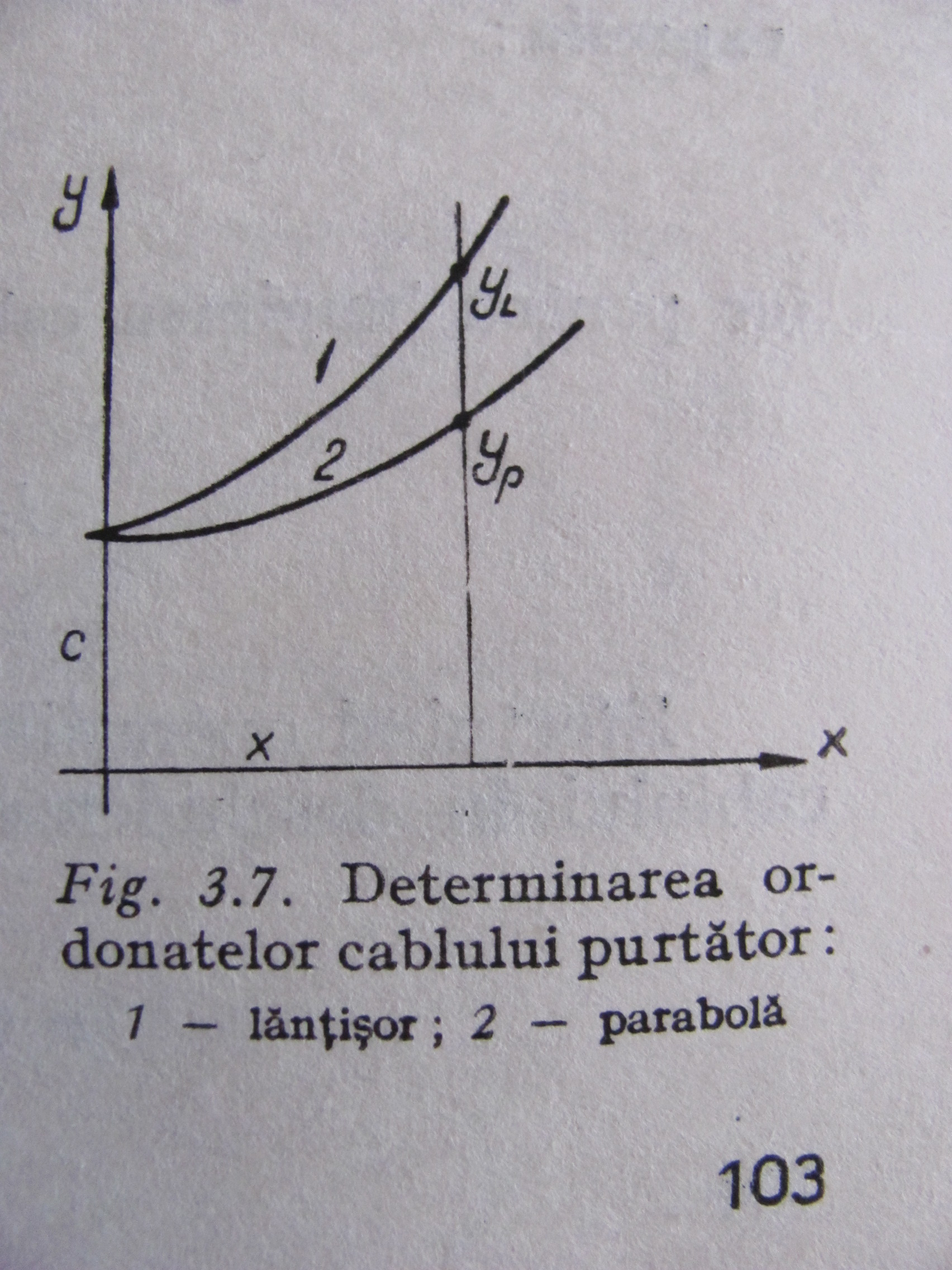 Determinarea grafica a diferentei de eroare la lantisor si parabola